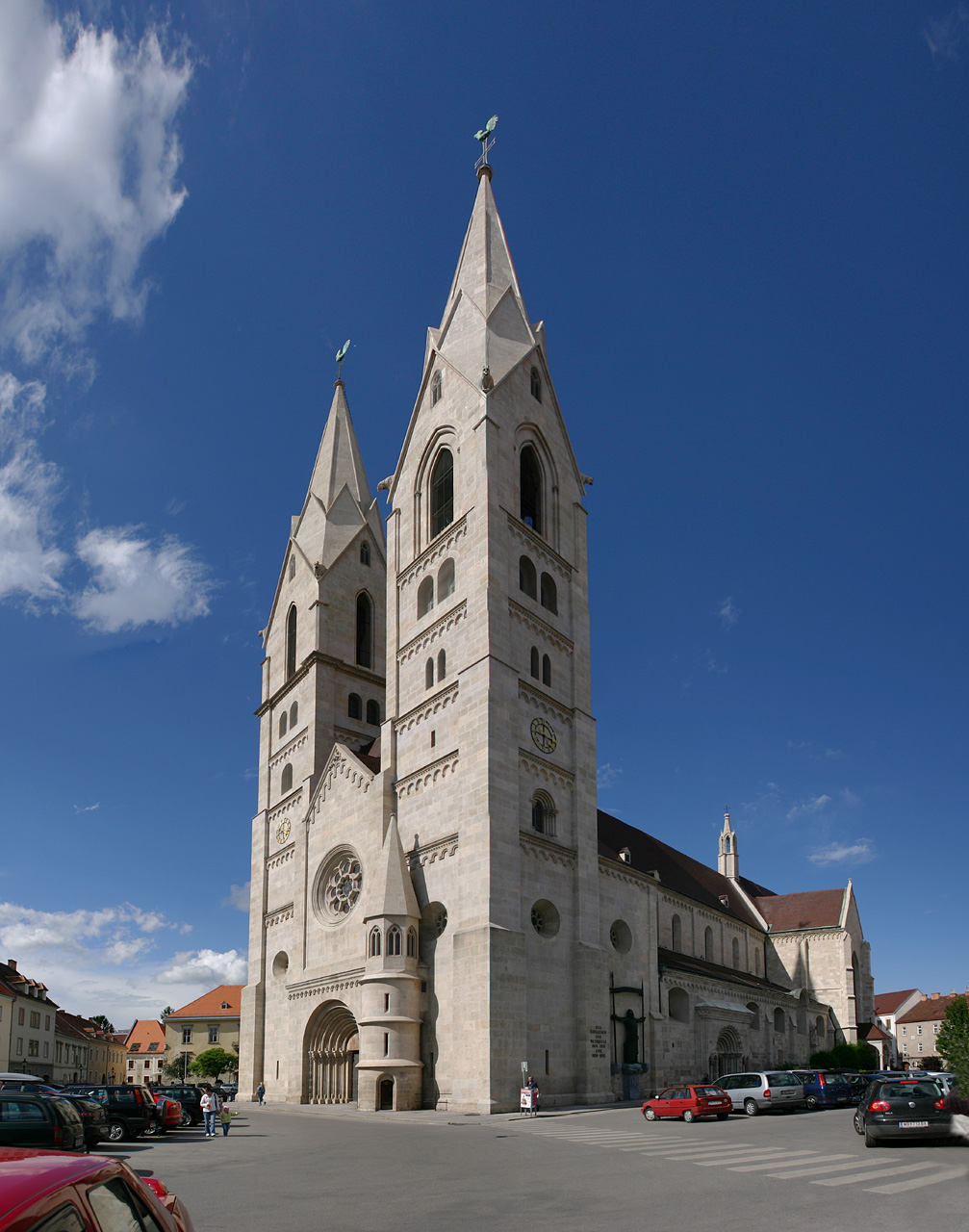 Außenansicht des Wiener Neustädter Doms